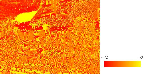 Aus dem Orginalbild erechnete Anstiegswinkel potentieller Kanten